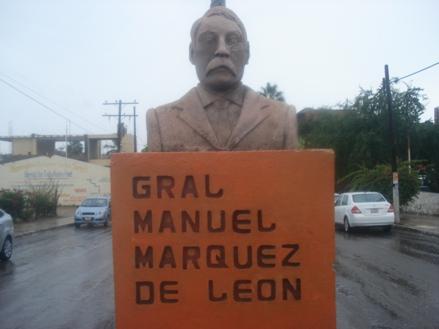 Estatua del General Manuel Márquez de Leon